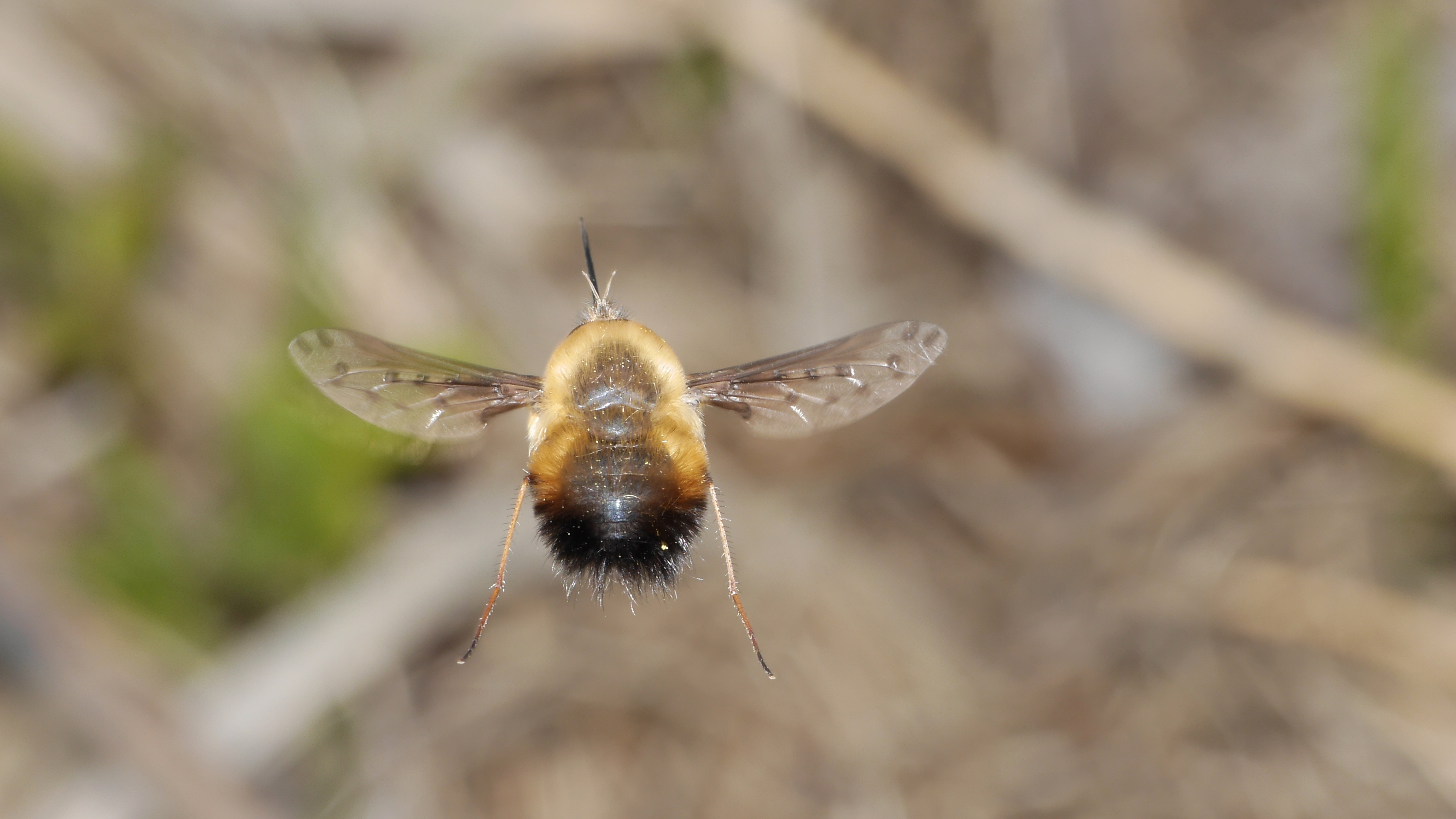 Gefleckter Wollschweber - Bombylius discolor. Aufgenommen in Mannheim, Kirschgartshäuser Schläge, Baden-Württemberg, Deutschland.